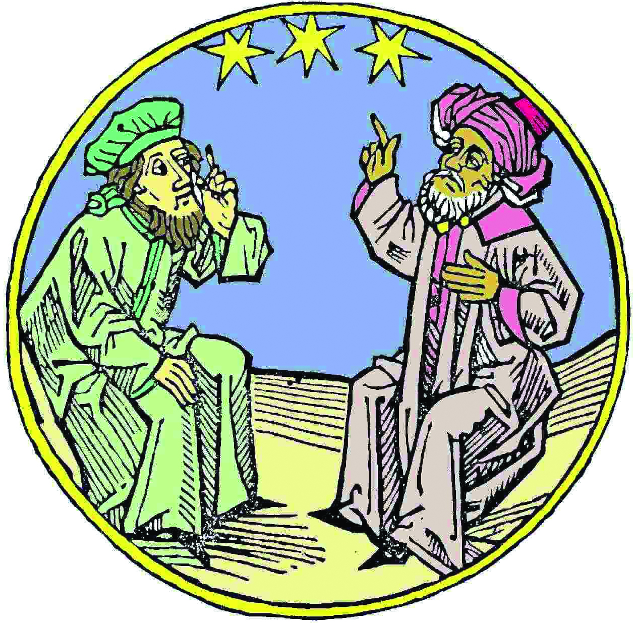 Ecole des interprètes de Tolède